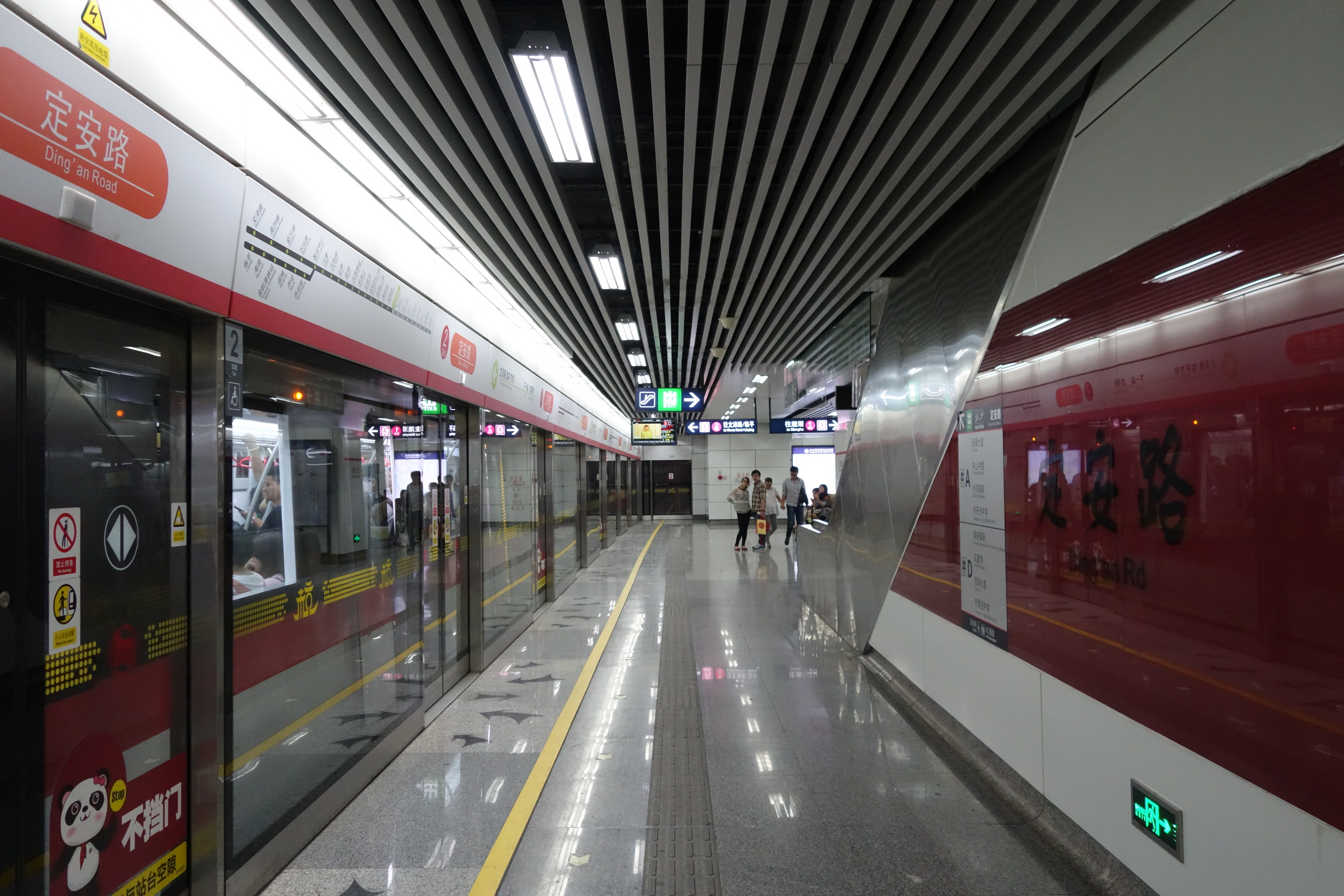 杭州地铁定安路站